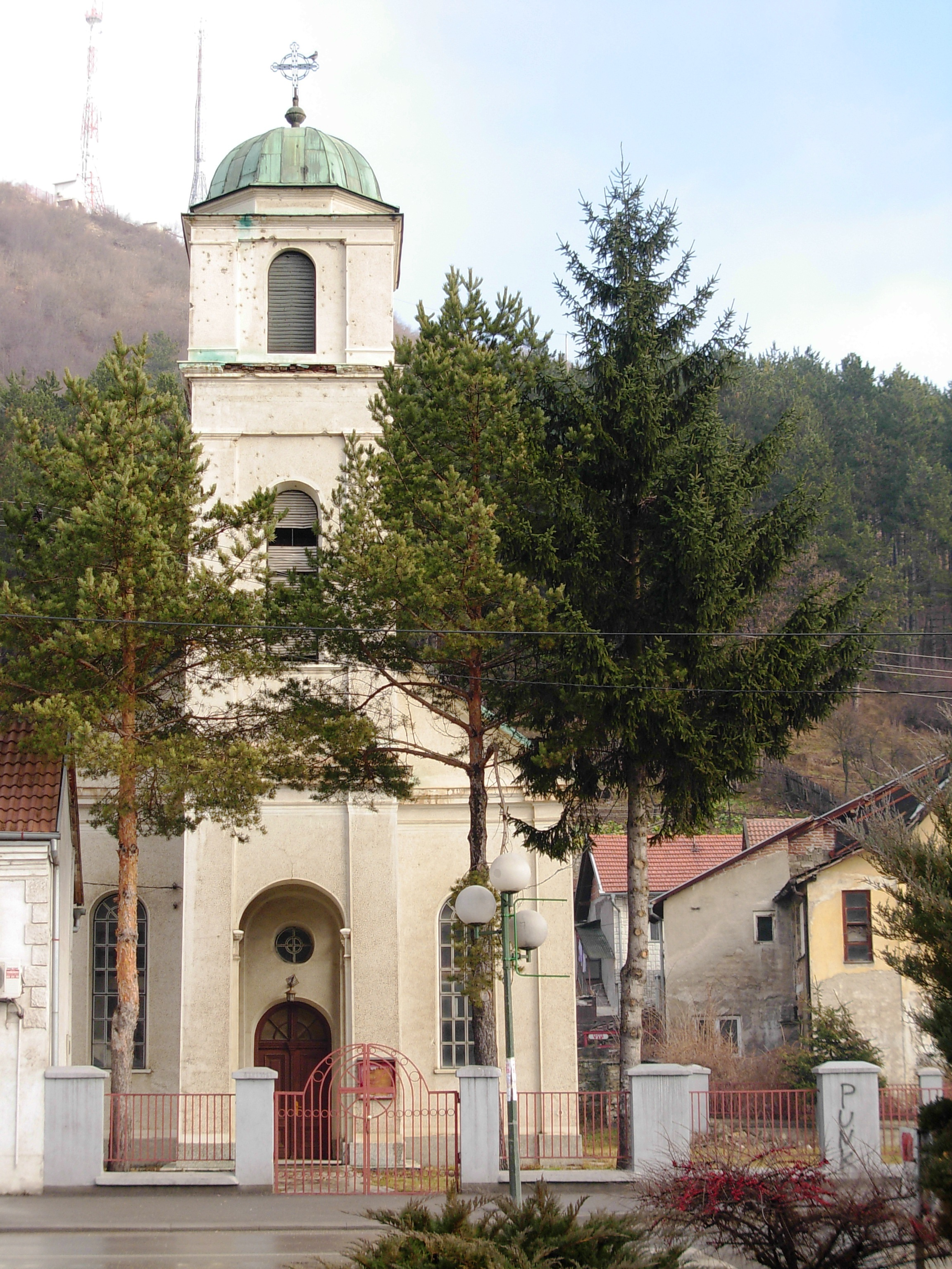 Pravoslavna crkva u Donjem Vakufu.